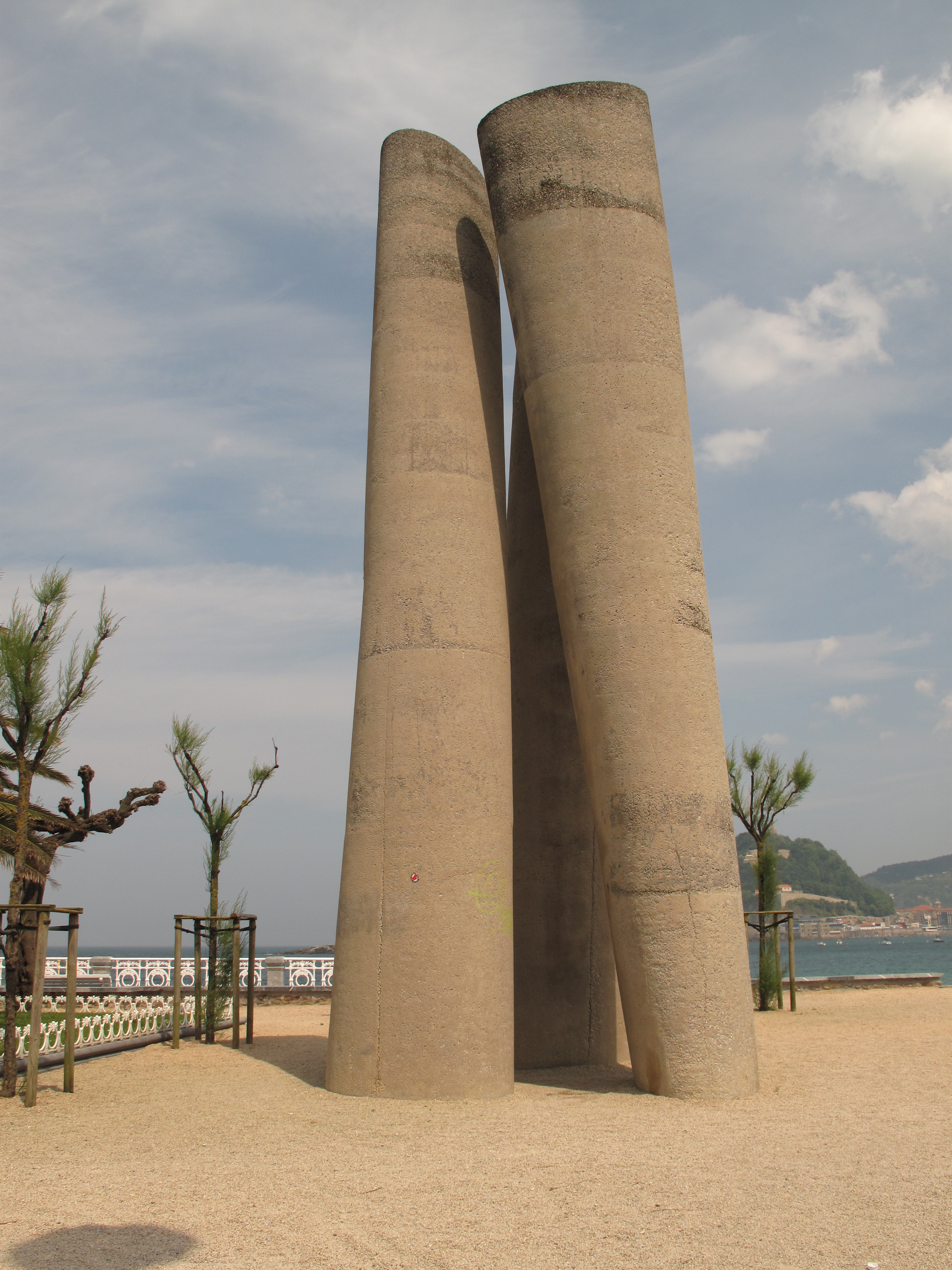 Zeharki (1983-1989), escultura de José Ramón Anda en Paseo de Satrustegui (jardines de Ondarreta) de Donostia - San Sebastián